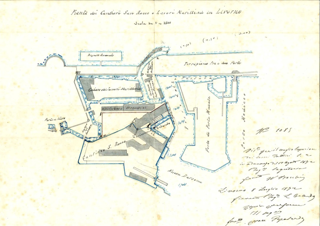 Planimetria del Cantiere navale Fratelli Orlando comprendente i Cantieri San Rocco e Lavori Marittimi, Livorno 12 agosto 1872 (AS Livorno, Archivio storico del Cantiere navale Luigi Orlando di Livorno)